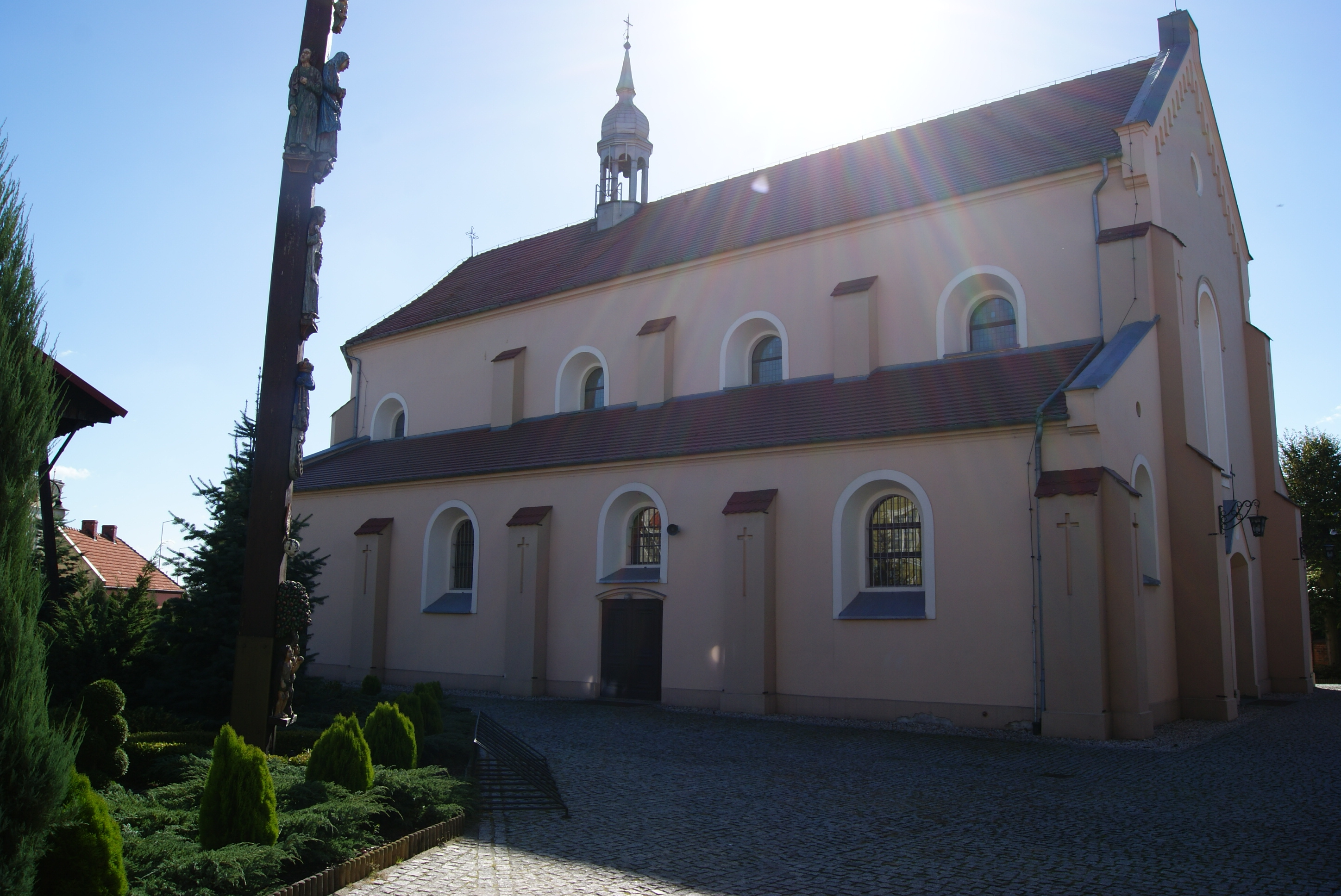 Od frontu